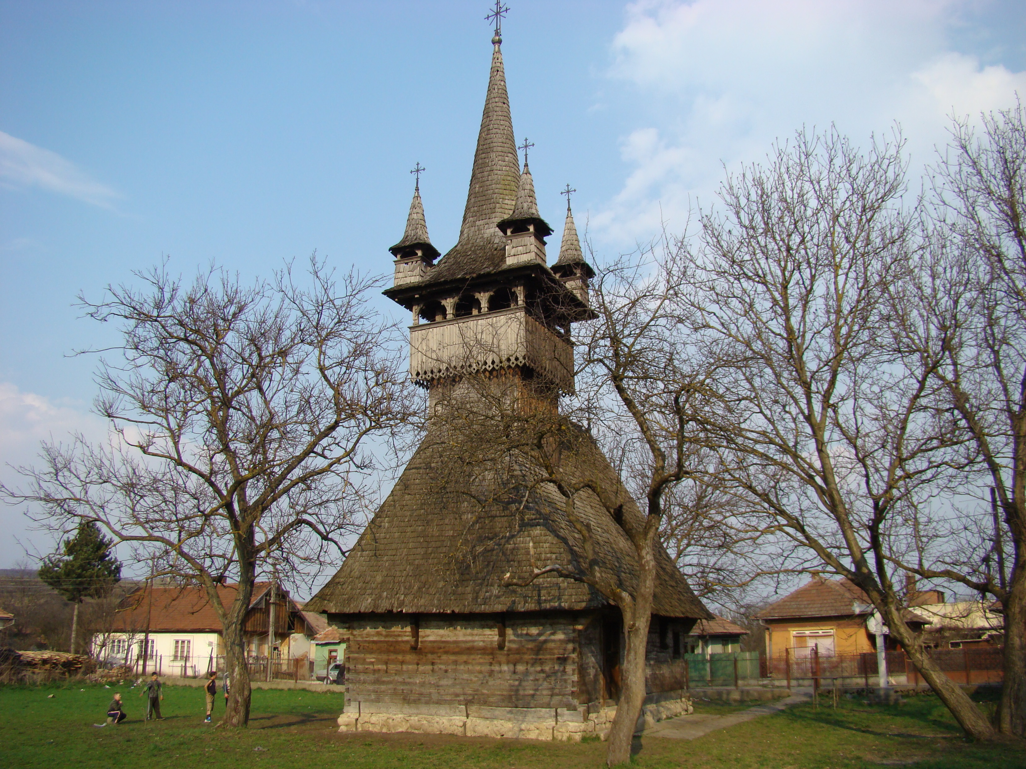 Biserica de lemn „Sf.Arhangheli” din Aghireșu, județul Cluj